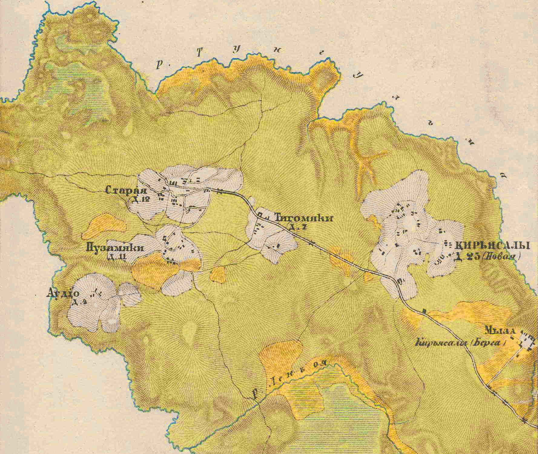 Мыза Кирьясало на карте окрестностей Петербурга. 1885 г.